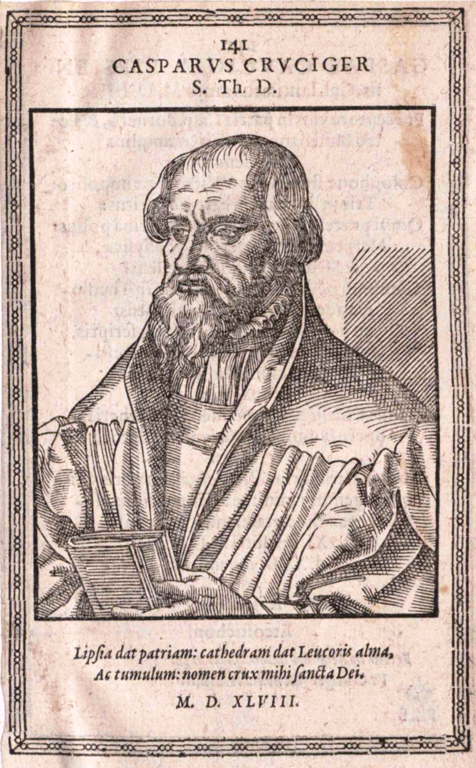 Kaspar Cruciger (1504–1548)